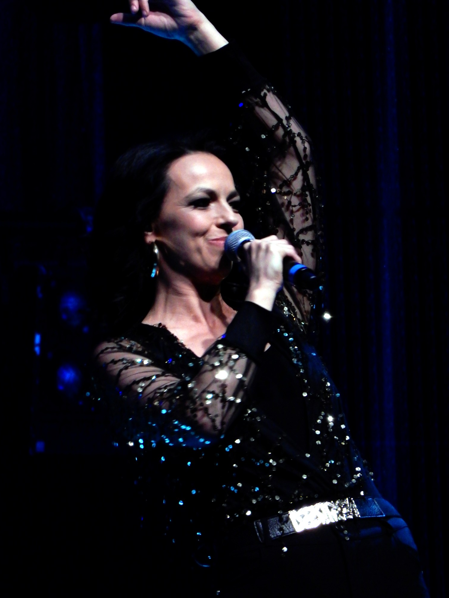 Petra Frey live bei "Die Große Schlagerparty" in Salzburg!